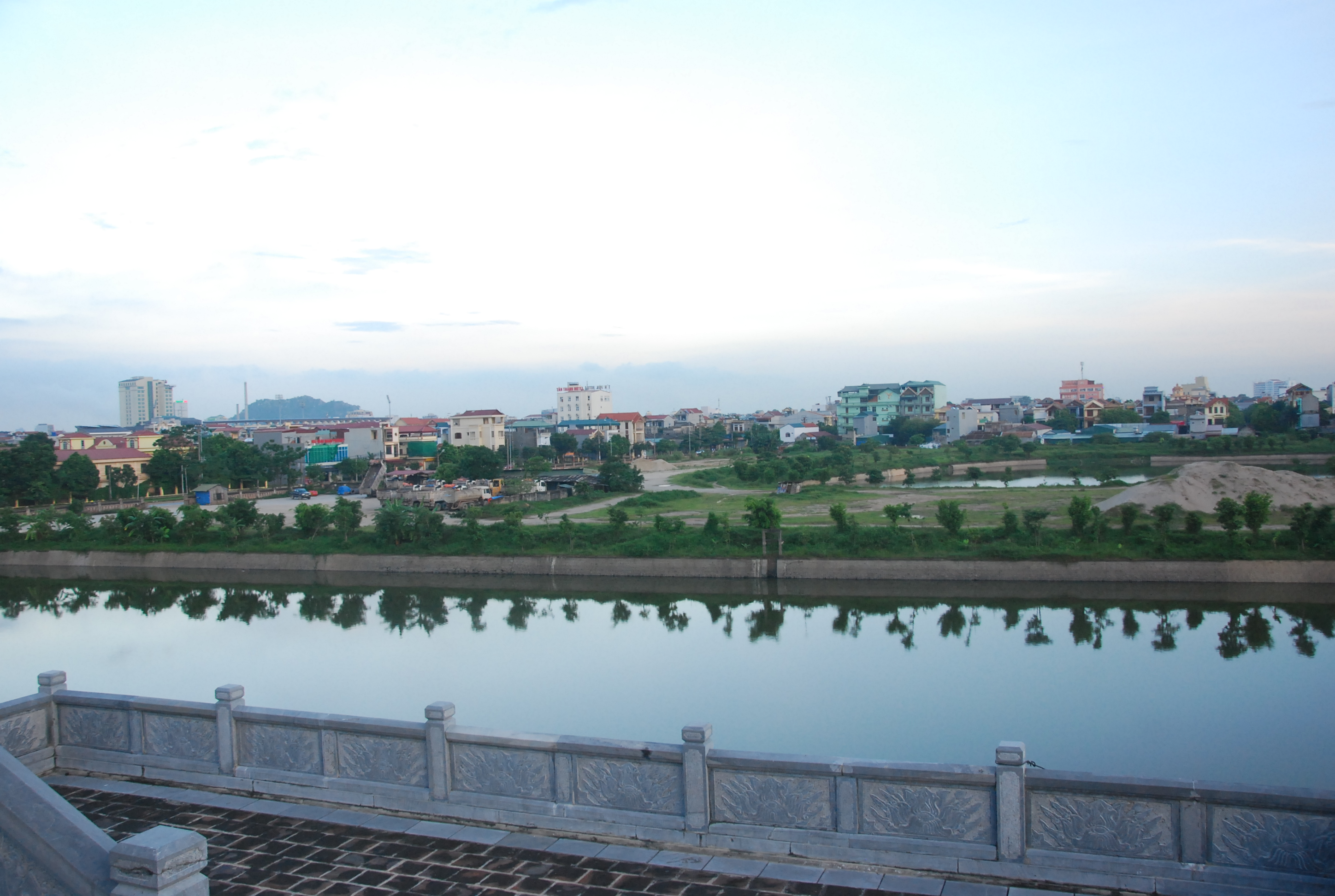 Phong cảnh khu vực Cổng Tràng An ở thành phố Ninh Bình